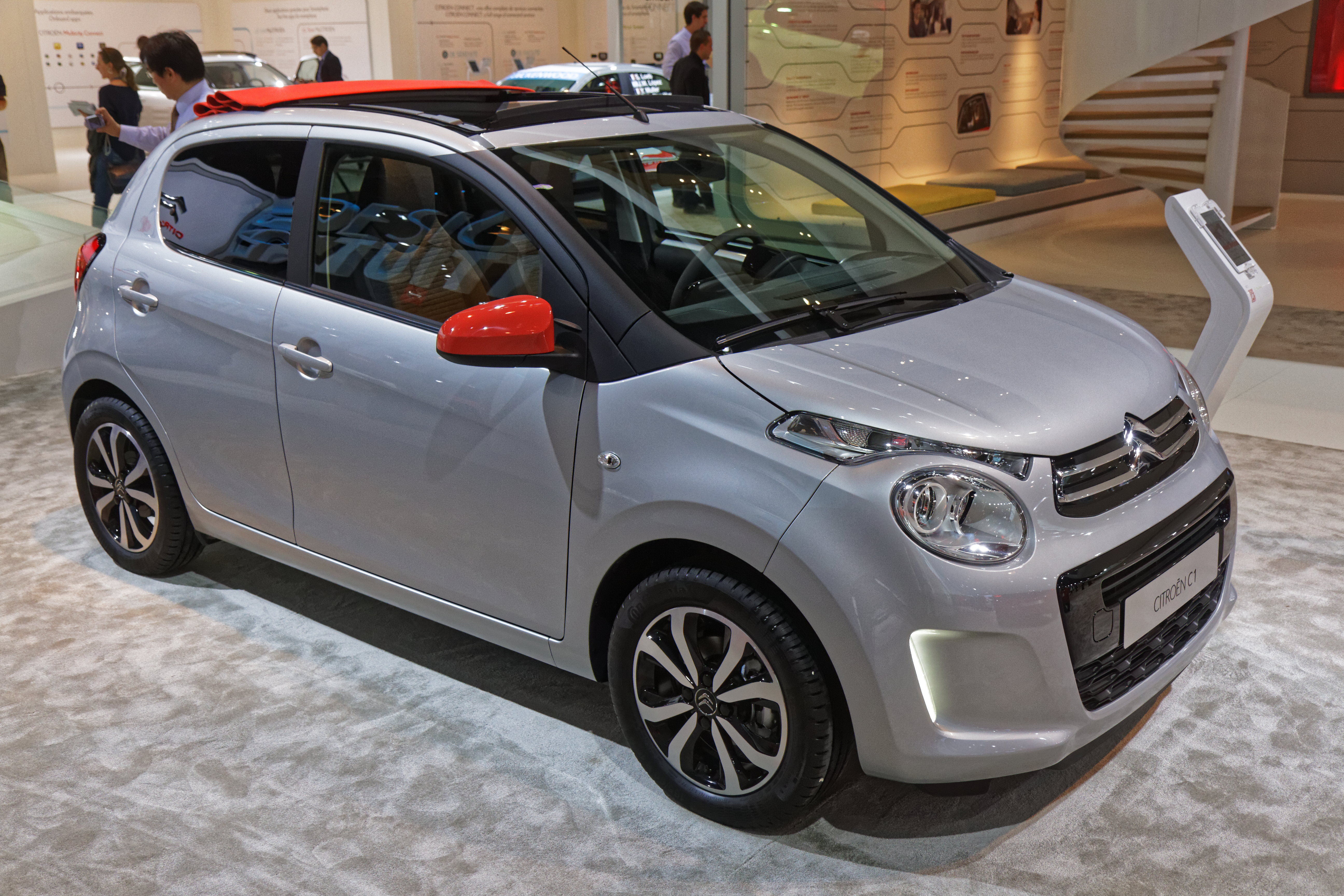 Une Citroën C1 présentée lors du mondial de l'automobile de Paris 2014.